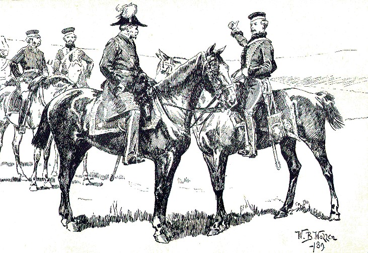 Le capitaine Nolan transmettant l'ordre d'attaque à la brigade légère lors de la bataille de Balaklava, le 25 octobre 1854. Nolan fut tué quelques instants plus tard par l'un des tout premiers obus russes. Le cavalier à gauche est Lord Lucan, commandant de la cavalerie britannique.